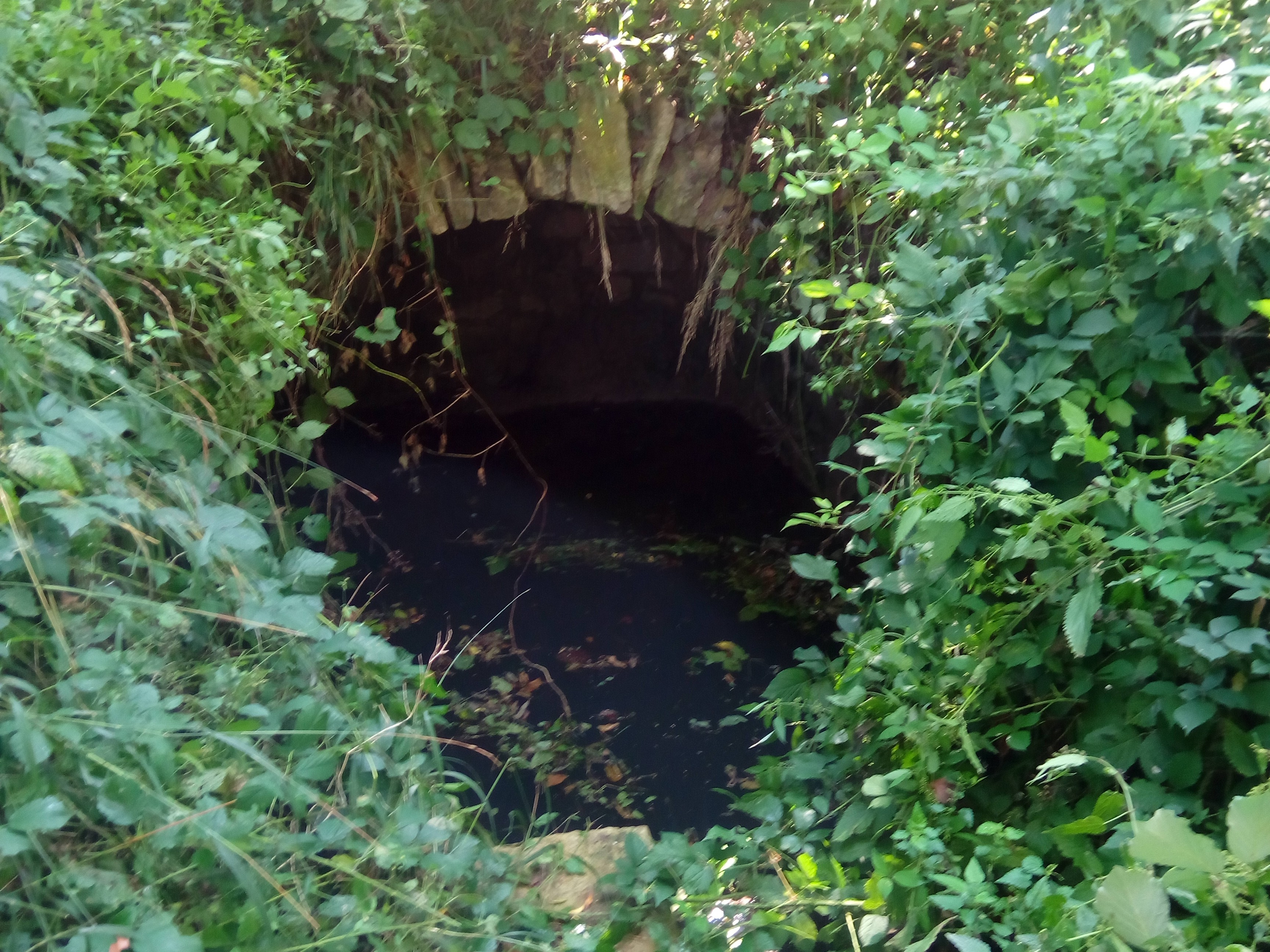 Dorfbrunnen der Wüstung Dollishof